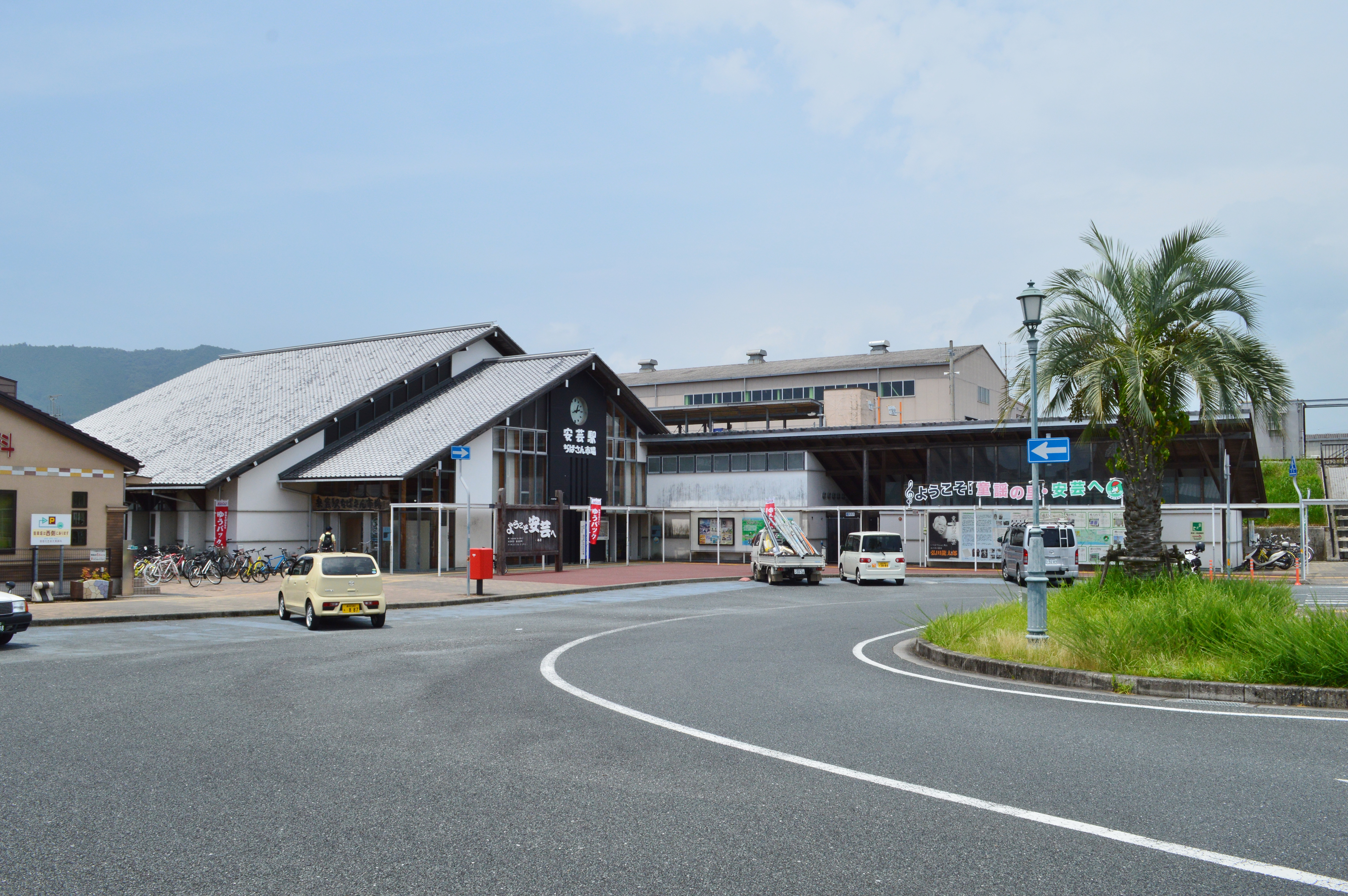 安芸駅 駅前ロータリー